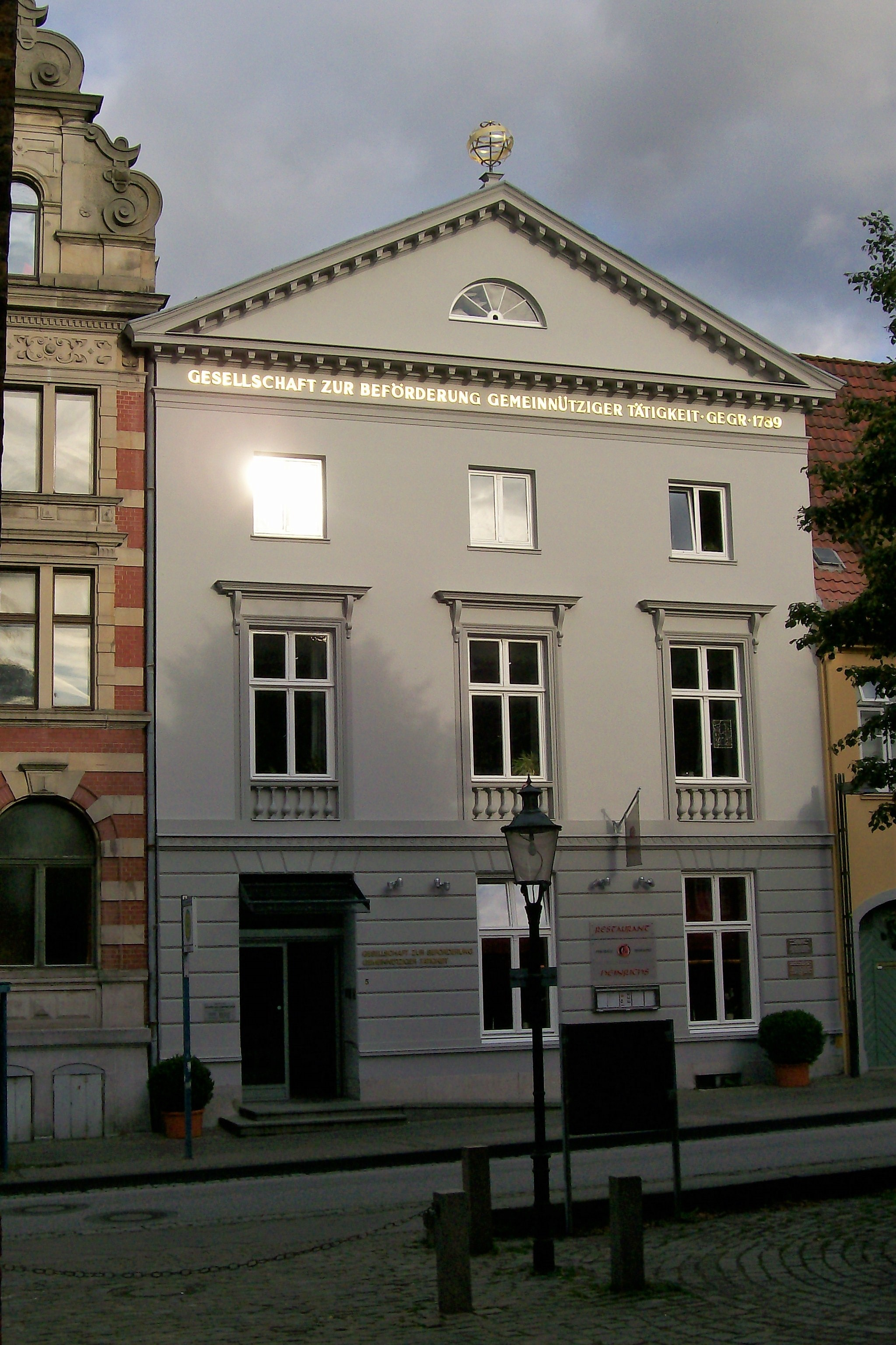 Königstraße 5 in Lübeck, Sitz der Gesellschaft zur Beförderung gemeinnütziger Tätigkeit